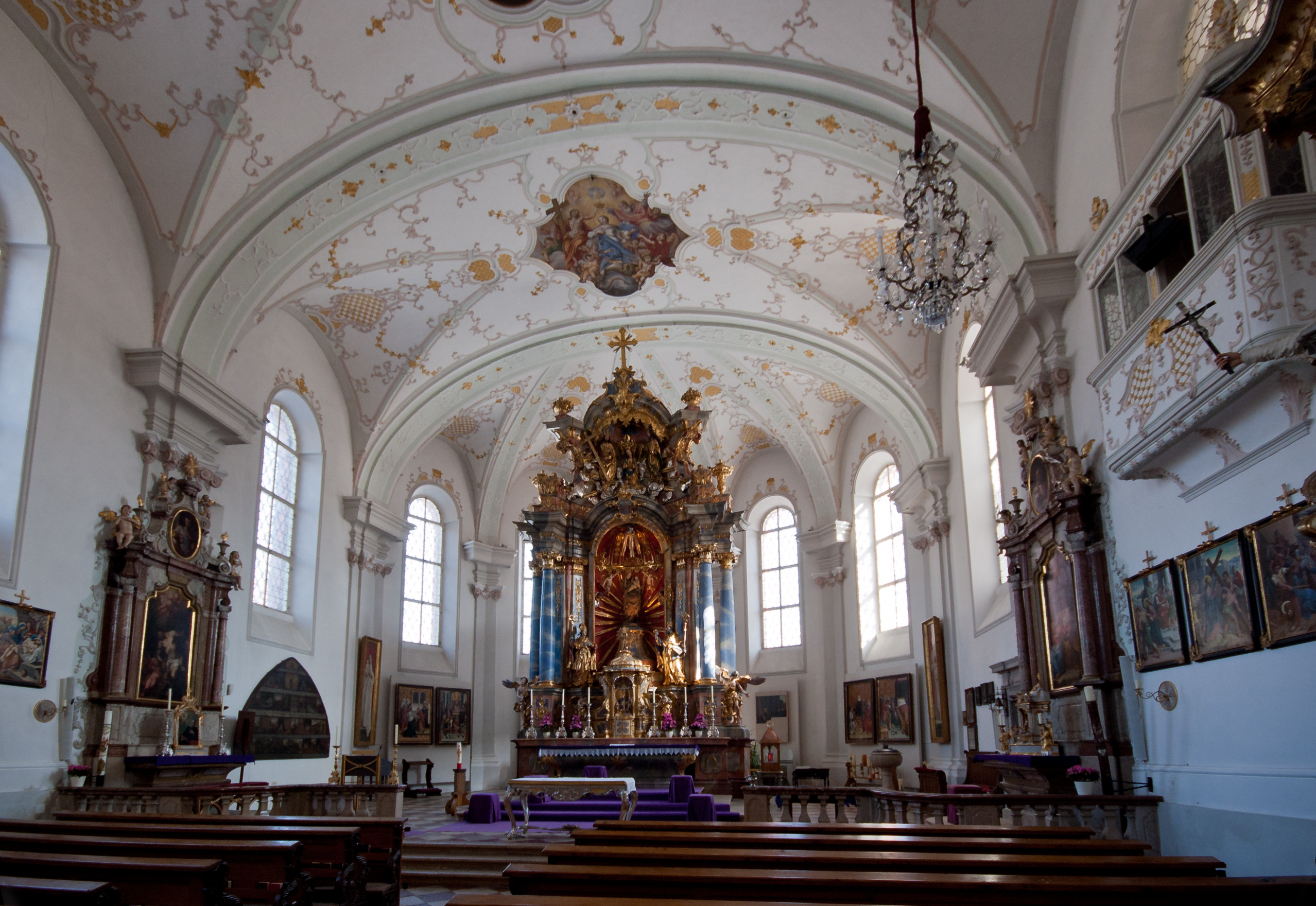 Innenraum der Liebfrauenkirche in Großgmain